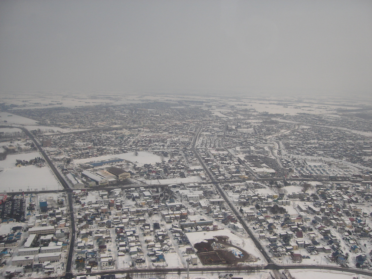 上空から見た恵庭市（東を望む） 2007年2月撮影 撮影者 - NipponiaNippon 著作権 - 同上